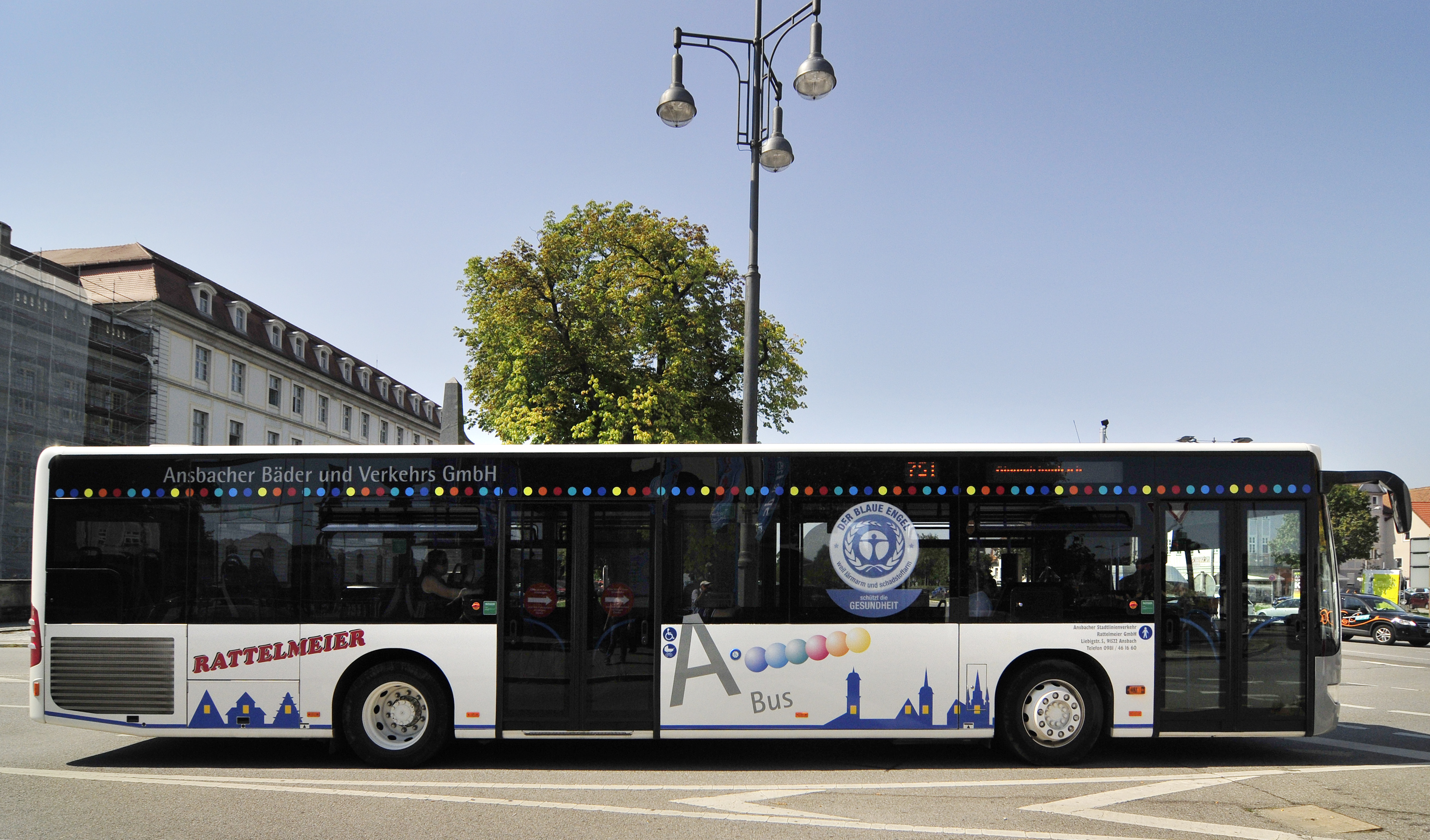 Ansbacher Stadtbusse